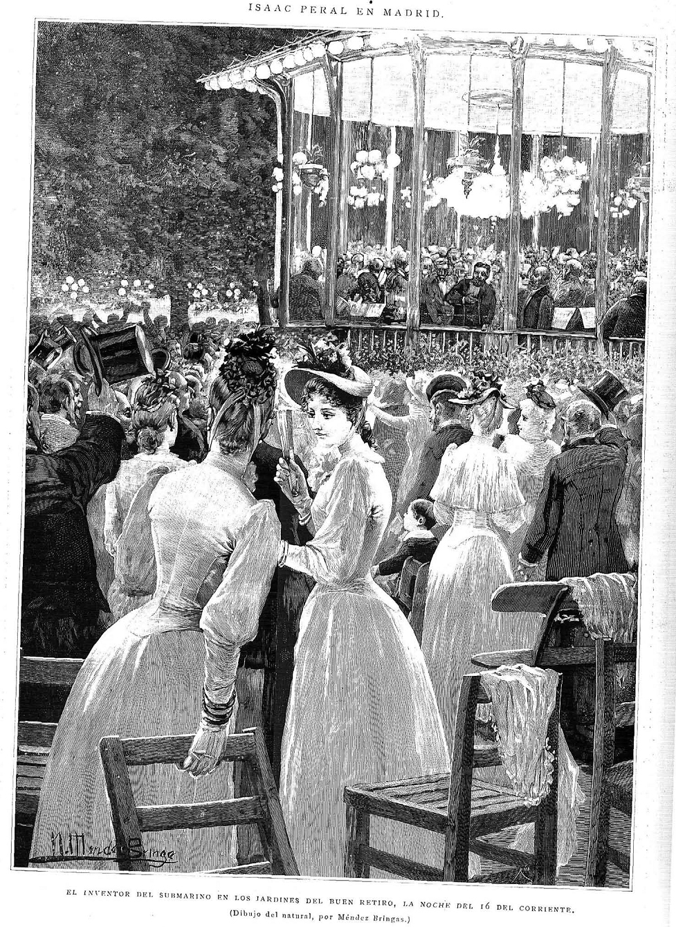 Isaac Peral en Madrid - El inventor del submarino en los jardines del Buen Retiro, la noche del 16 del corriente, dibujo del natural de Narciso Méndez Bringa, en la revista La Ilustración Española y Americana.